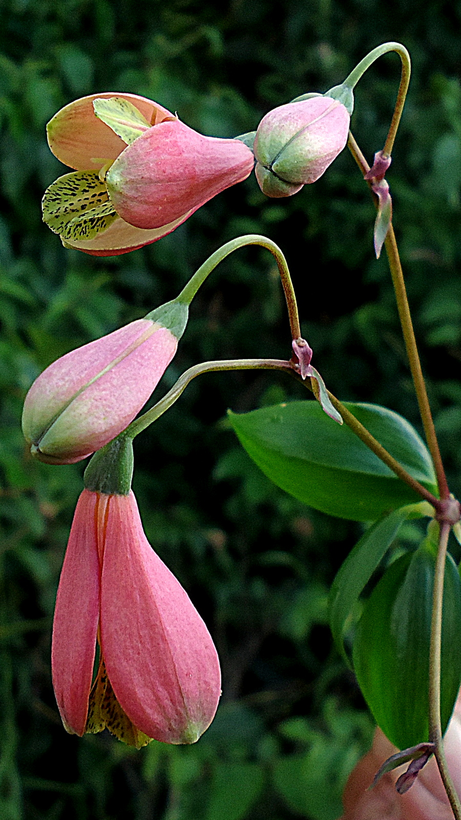 Bomarea edulis Herb.